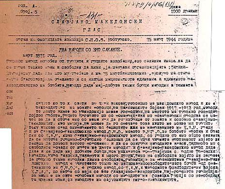 Начална страница на вестник „Славяномакедонски глас“.